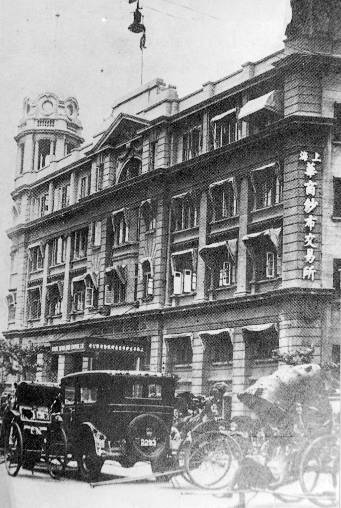 中文（中国大陆）: 上海华商纱布交易所大楼旧景